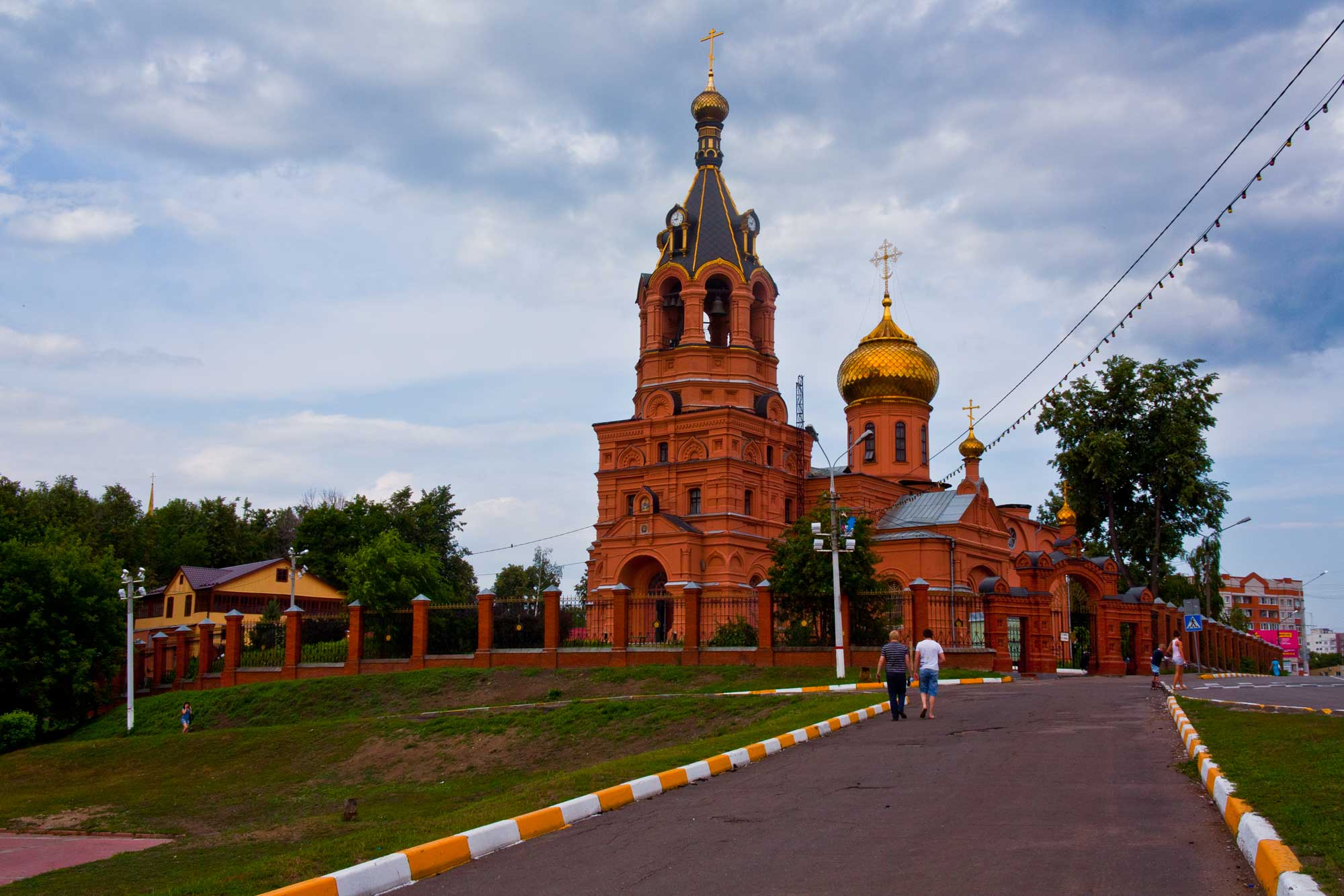 Собор Троицы Живоначальной в городе Раменское Московской области, Россия.